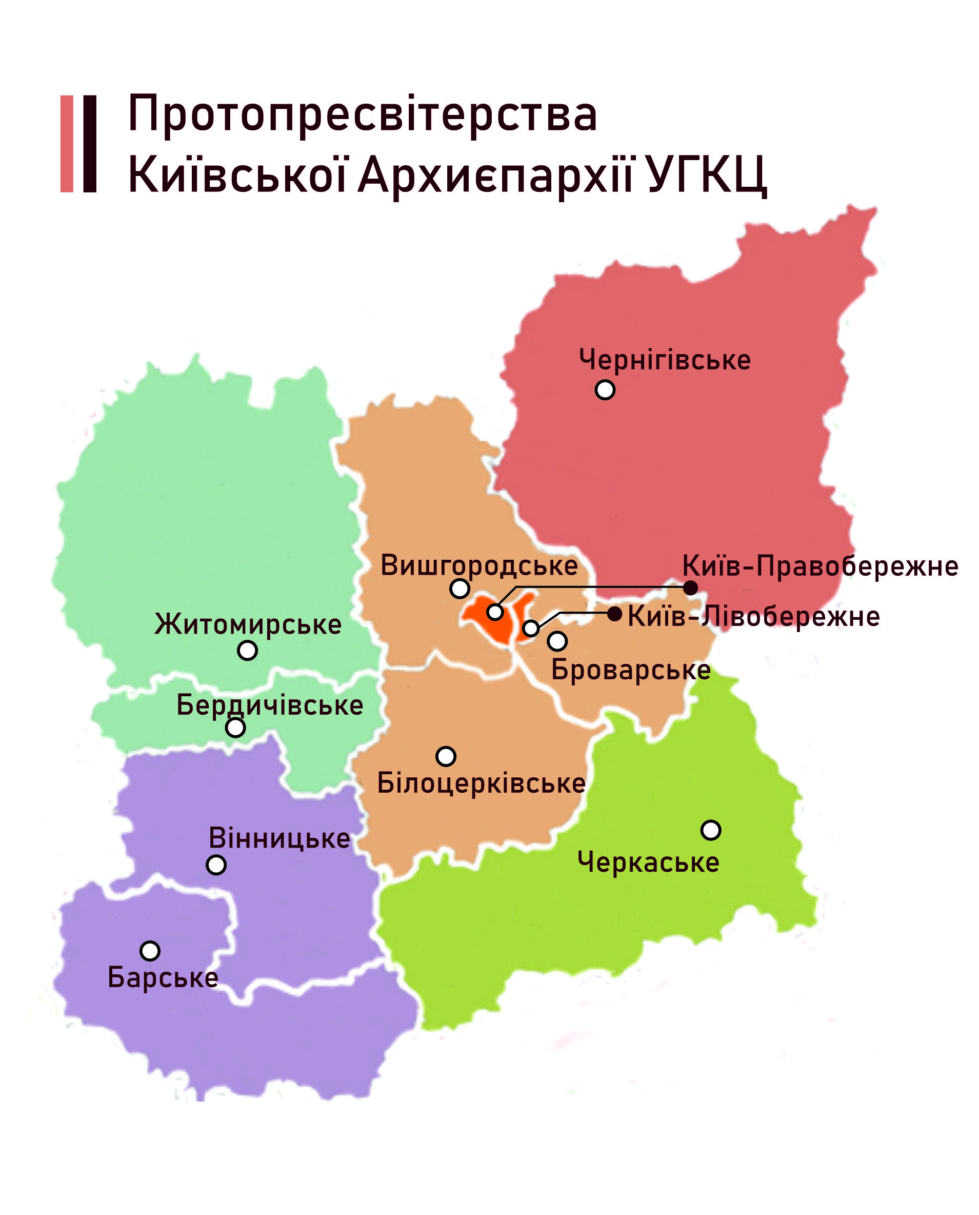 Протопресвітерства Київської Архиєпархії УГКЦ